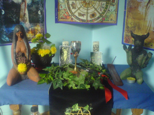 Llun sy'n darlunio Allor Wicaidd, ar gyfer Calan Mai.